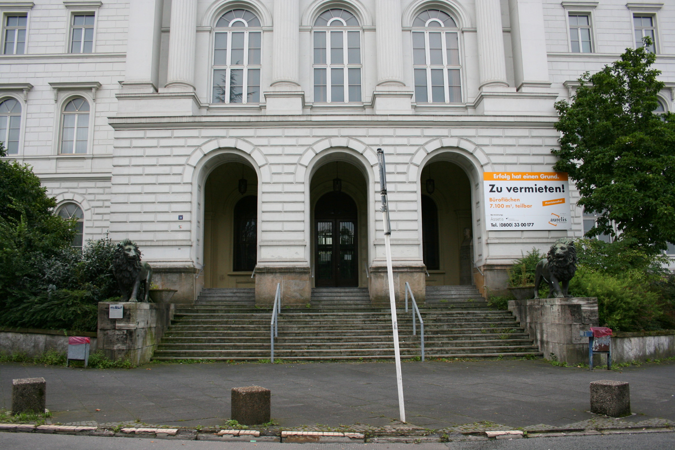 Gebäude der ehemaligen Bundesbahndirektion in Wuppertal, derzeit leer stehend